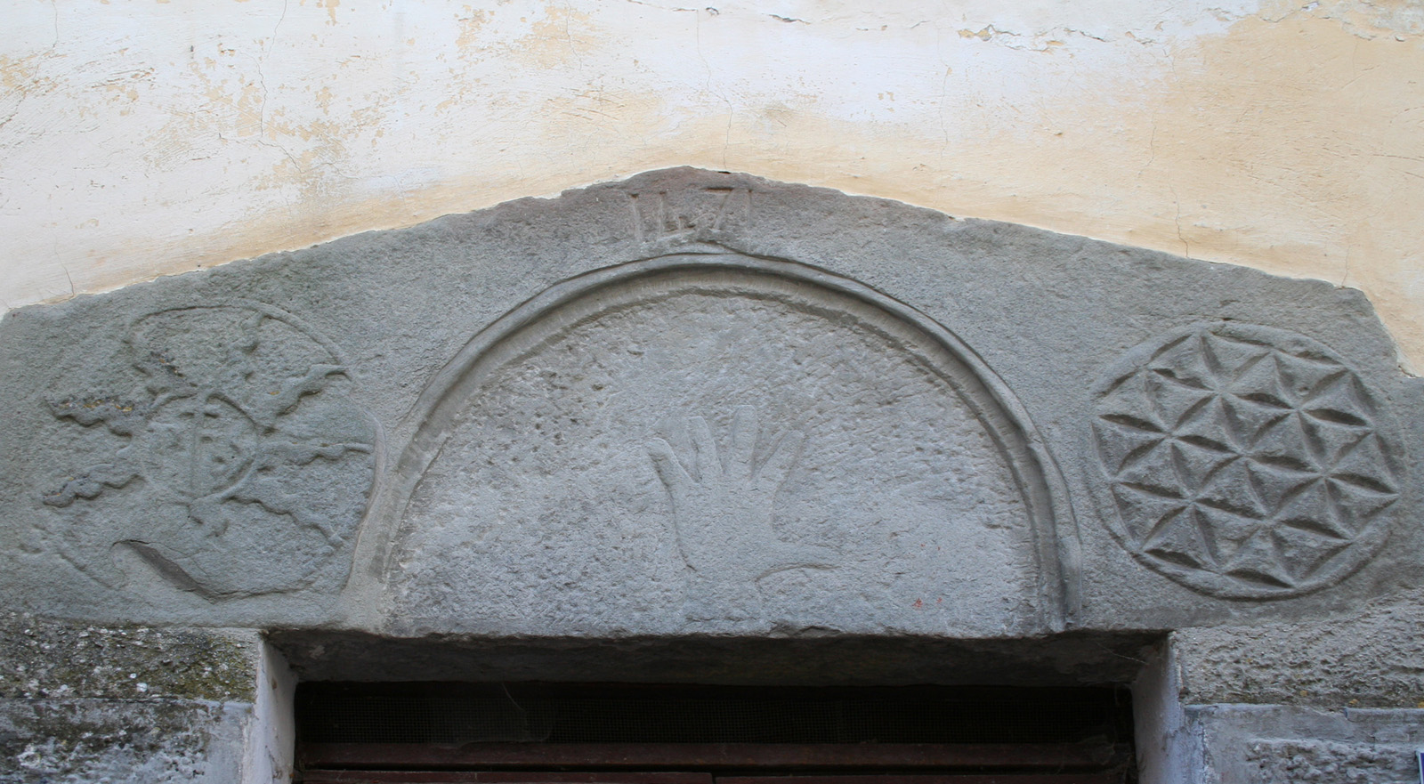 Pietracamela in provincia di Teramo, portale in pietra scolpito con bassorilievi, datato 1471, all'interno del paese.